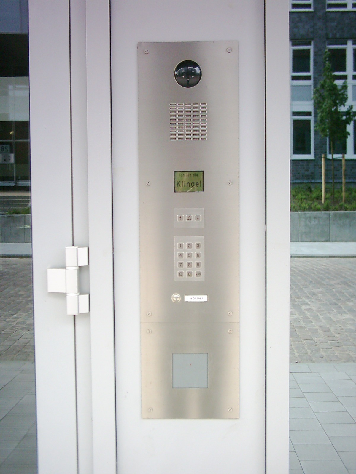 Haustürklingel mit Kamera, Textanzeigefeld, Ziffernblock und Pförtnertaste. Aufgenommen in Hamburg.